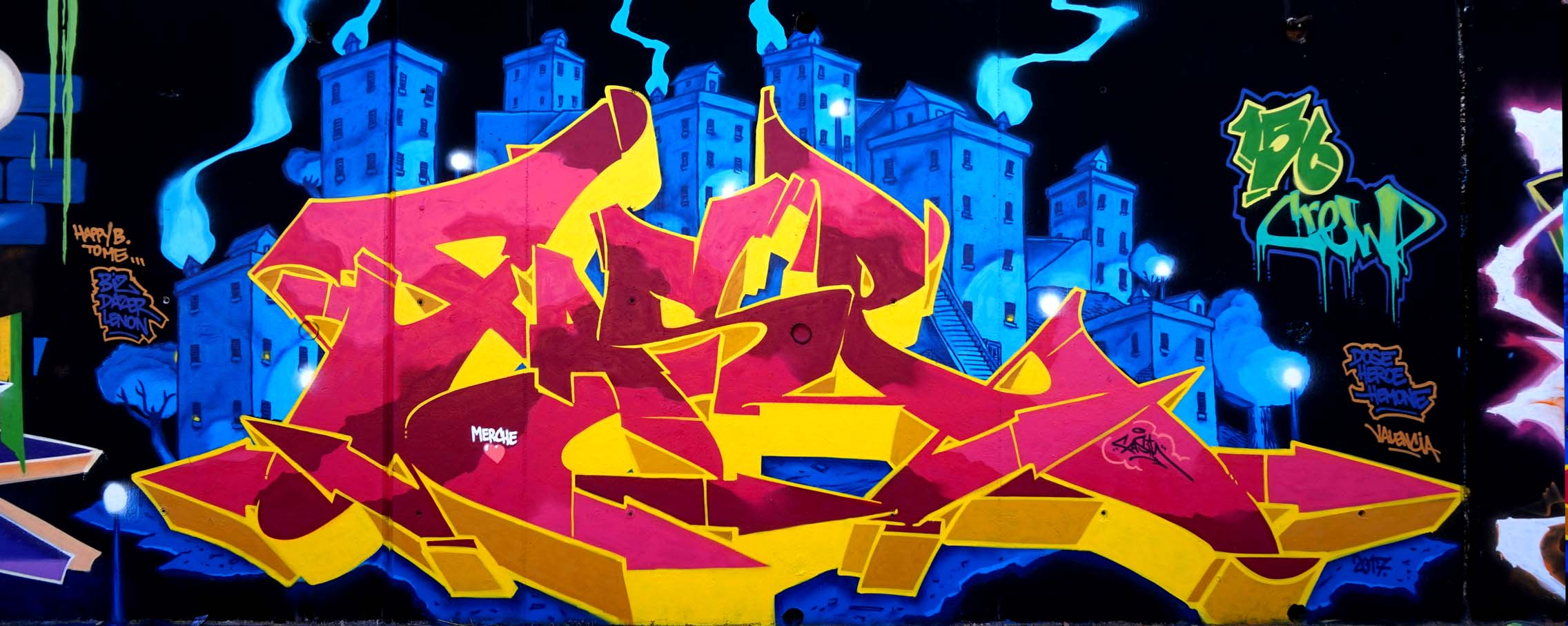 Obra del artista Fasim realizada el año 2017 con motivo de su cumpleaños junto a los artistas; Pro176, Derk y Emak. Valencia, 2017.